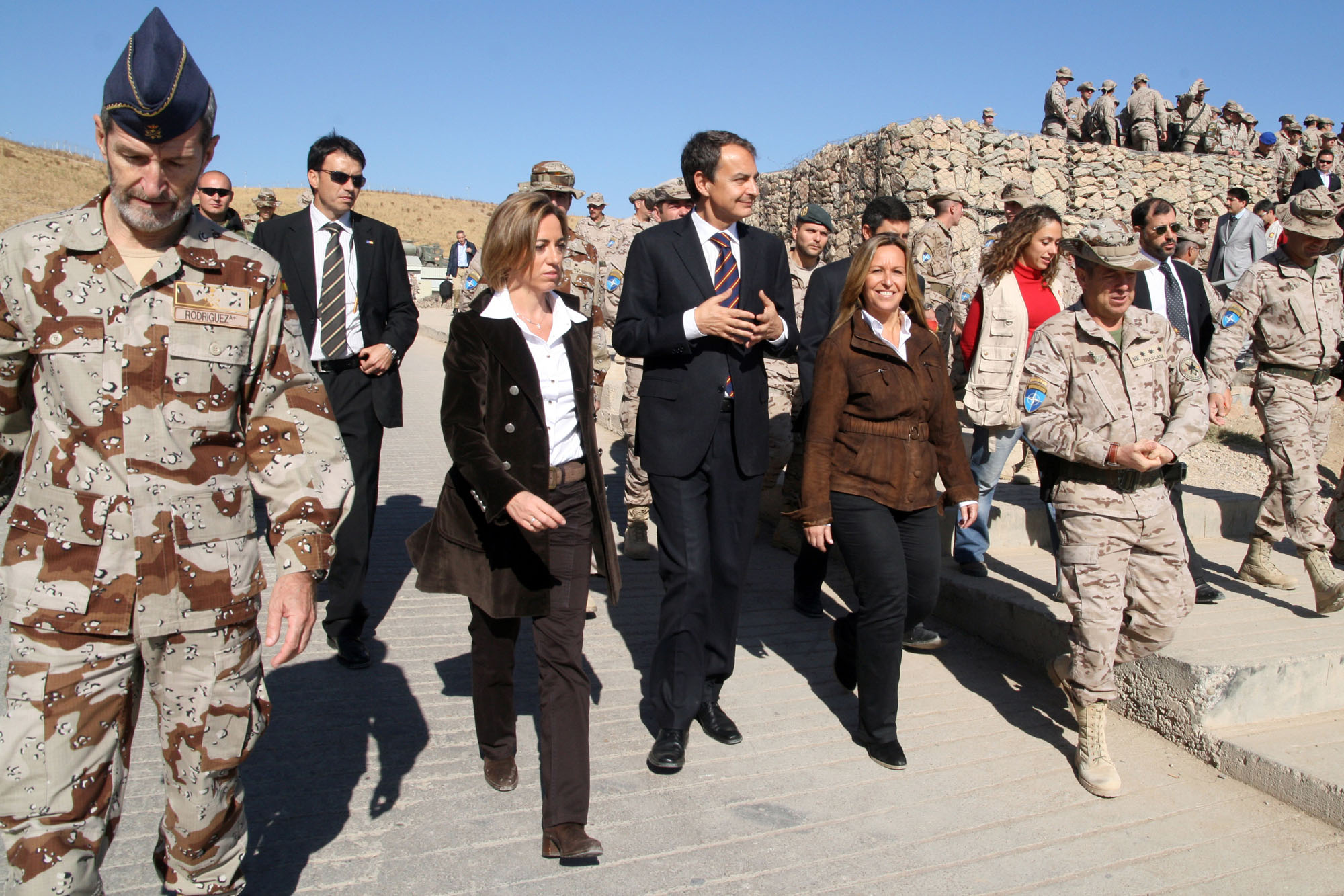 From left to right: ESP Armed Forces COS Gral. José Julio Rodríguez Fernández ESP MoD: Carmen Chacon ESP Prime Minister Jose Luis Rodriguez Zapatero ESP MoPA Trinidad Jimenez ESP PRT Cdr Colonel Trascasa 06th Nov 2010